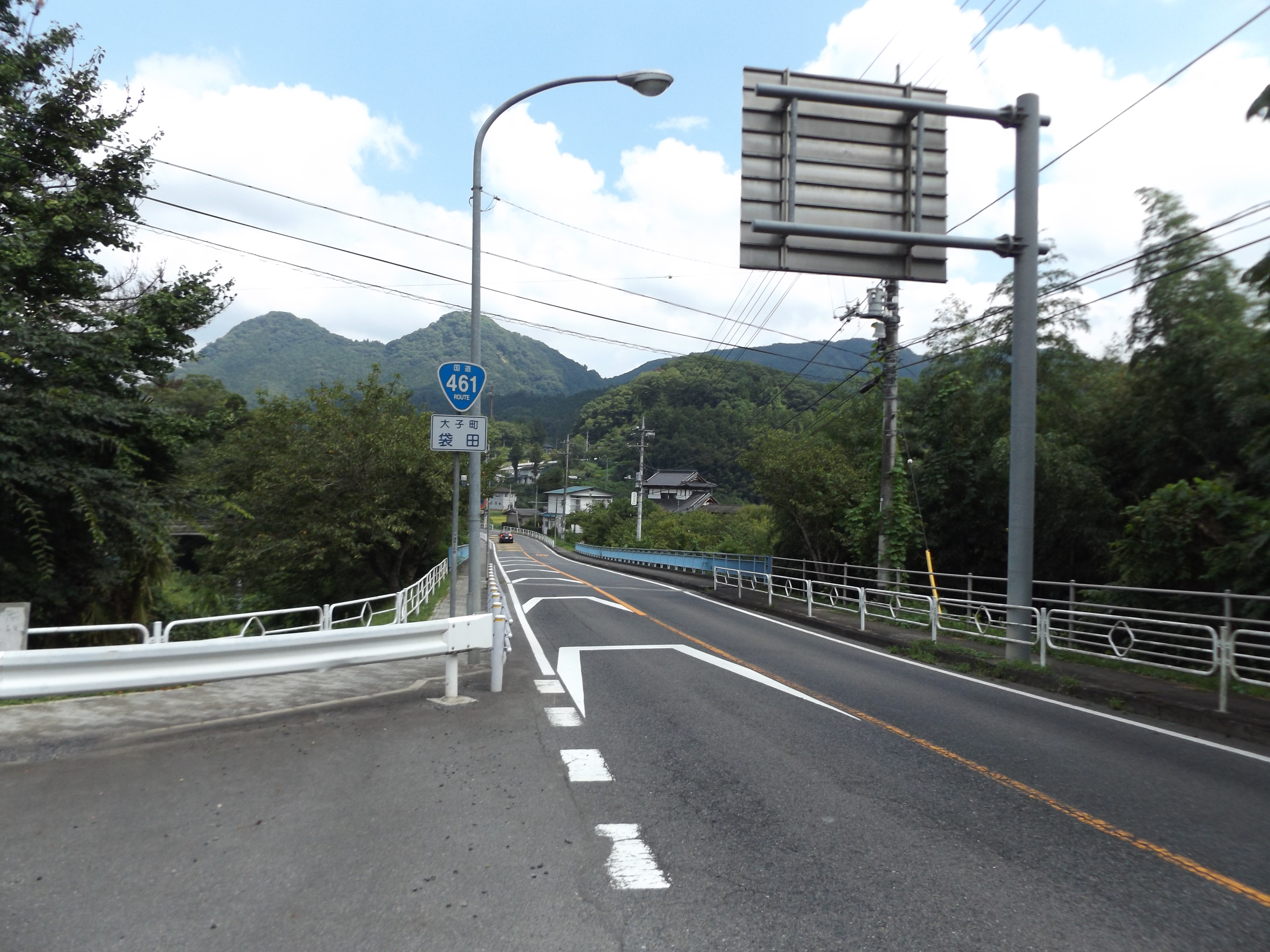 茨城県久慈郡大子町袋田にある国道461号の滝川橋。 その名の通り滝川に架かっている。